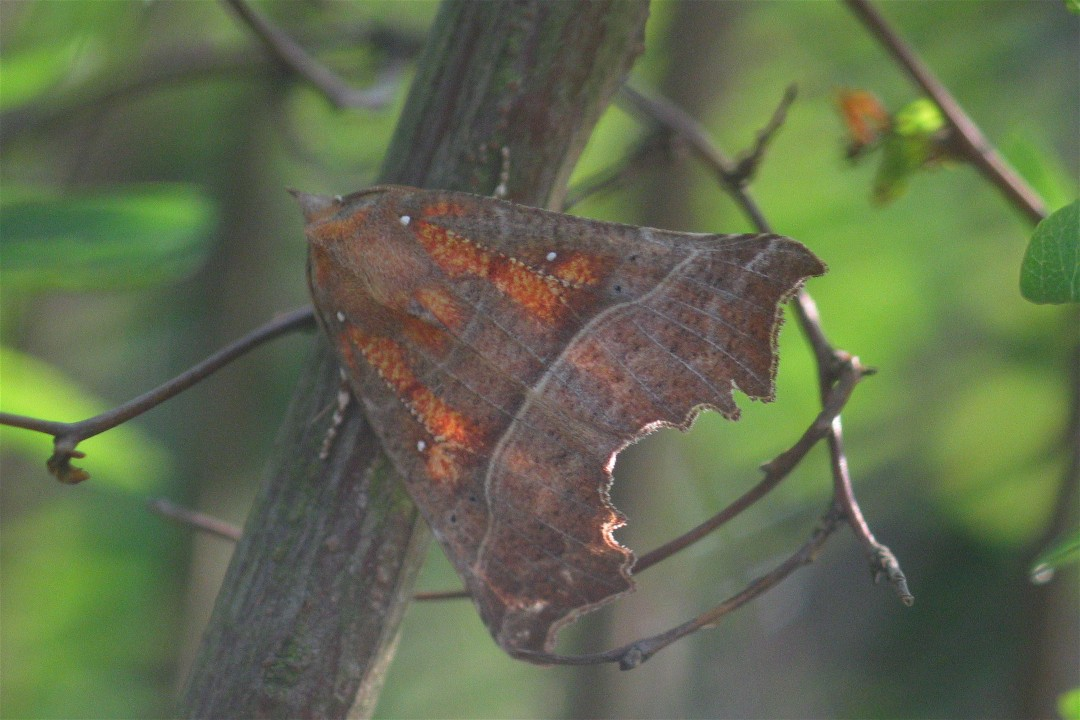 Zackeneule, auch Zimteule genannt (Scoliopteryx libatrix)